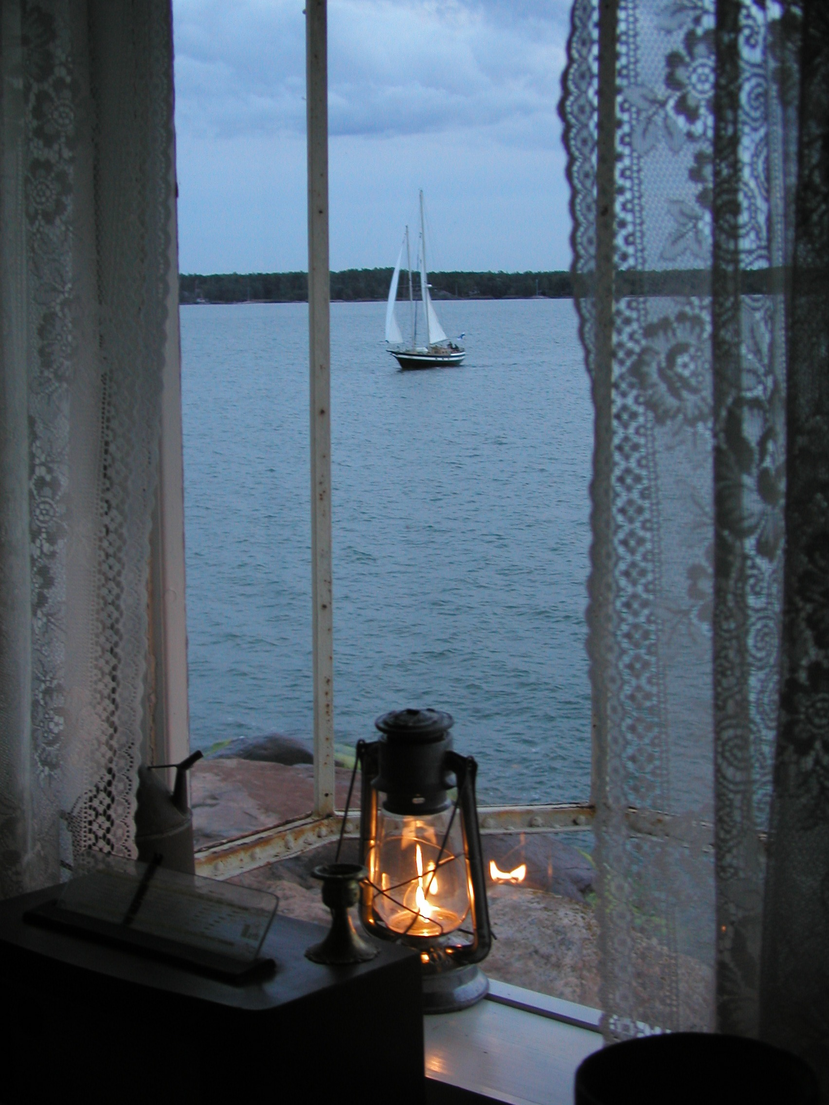 s/s Ukkopekka ikkuna Loisokarilla